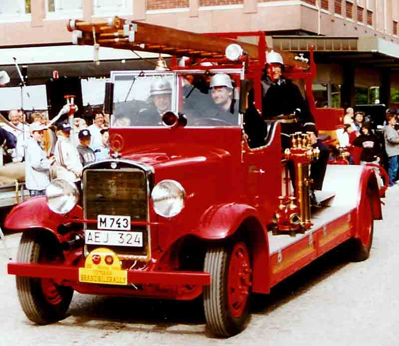 Volvo LV70D Fire Engine 1935.